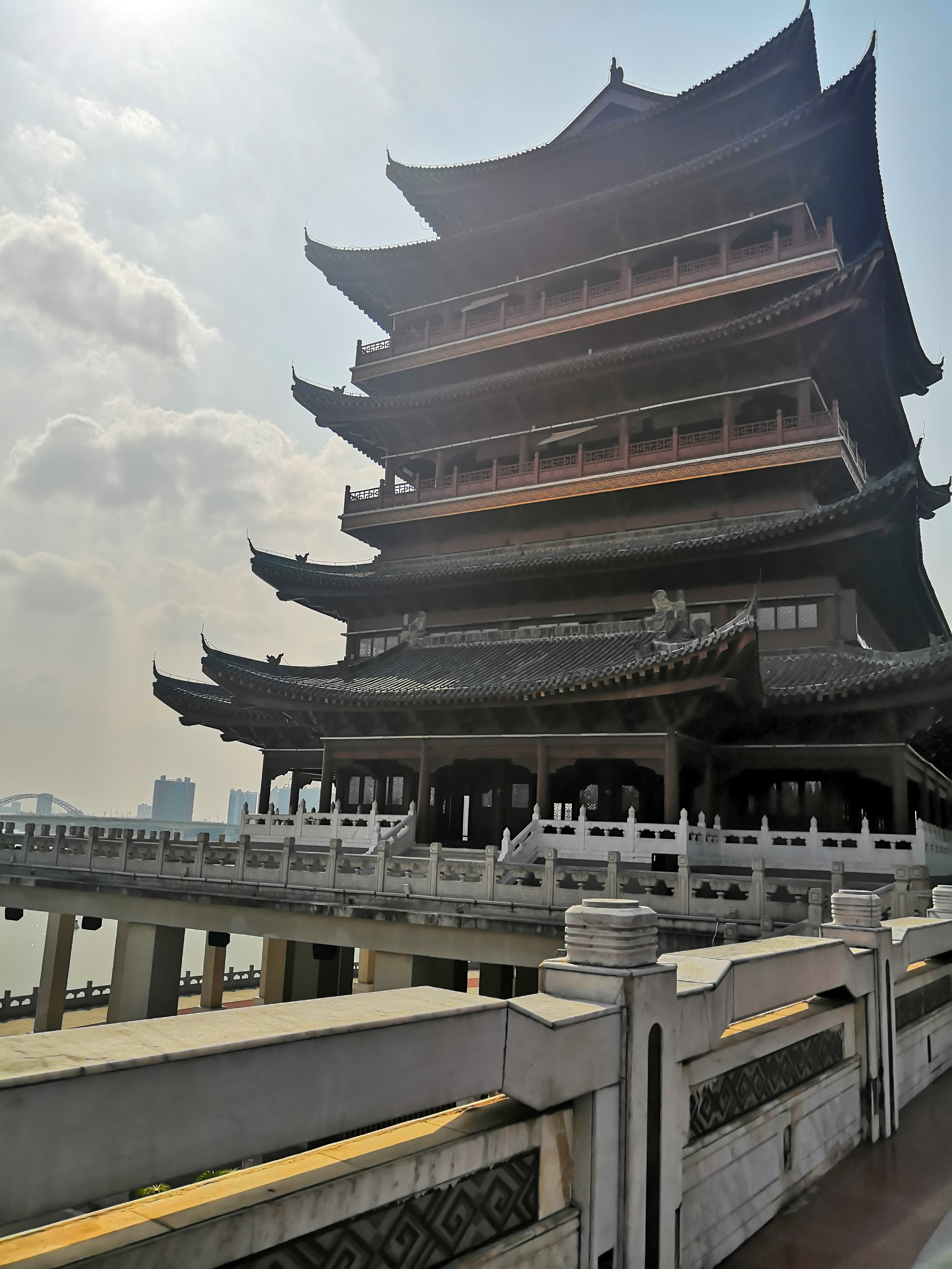 南宁畅游阁